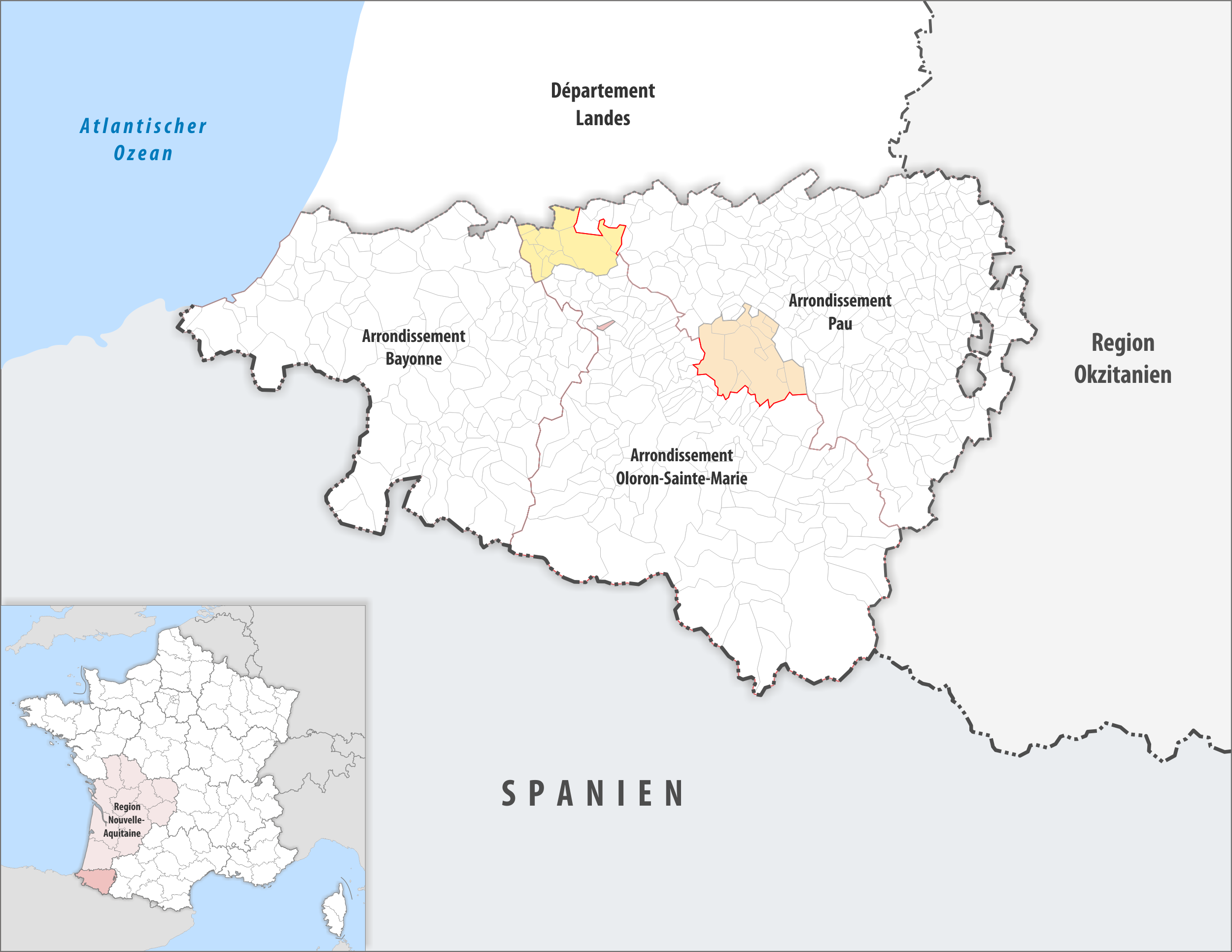 Arrondissements Anpassungen auf 2017 im Departement Pyrénées-Atlantiques